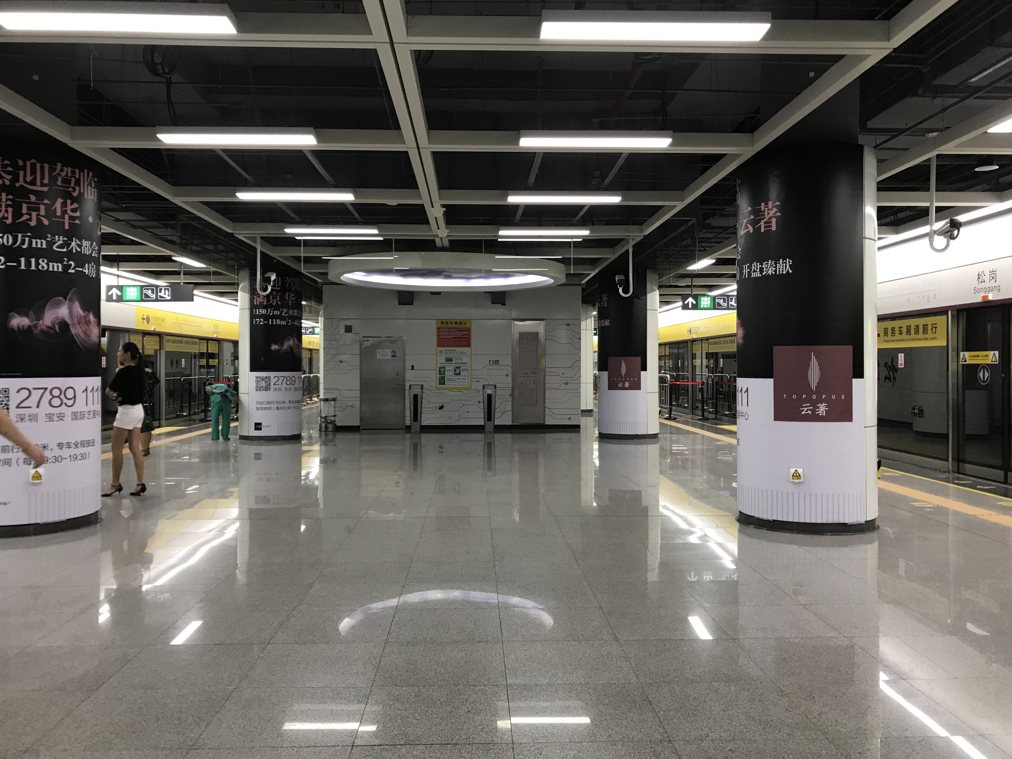 松崗駅のホーム